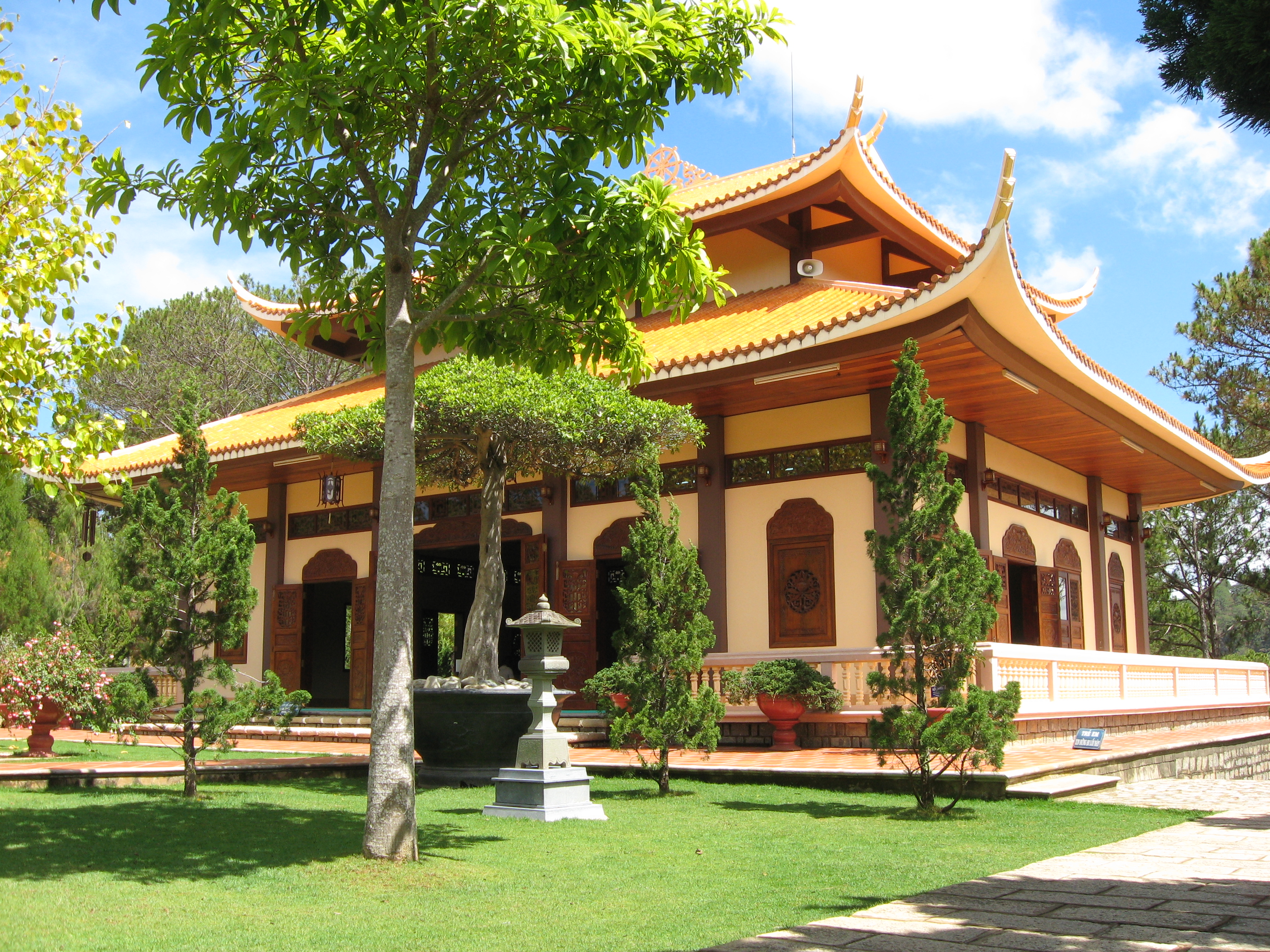 Truc Lam Zen Monastery